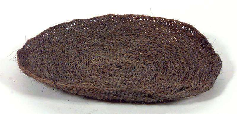 Silhår fra Alvdal i hedmark. Foto Norsk Folkemsuem, NFL.10283.